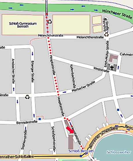 Karte Hospitalstrasse Benrath, Düsseldorf